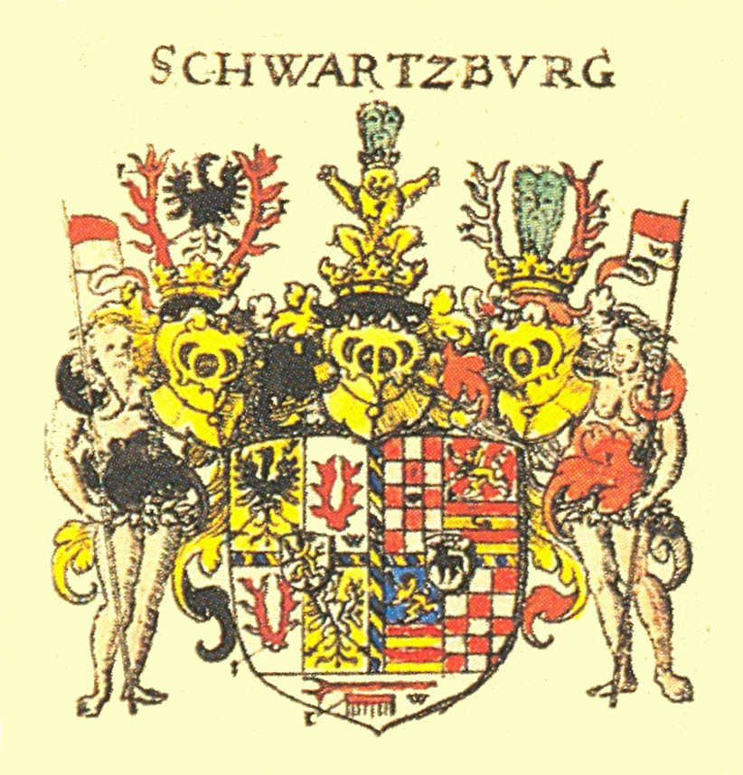 Wappen der europäischen Adelsfamilie Schwarzburg - Grafen des Heiligen Römischen Reiches